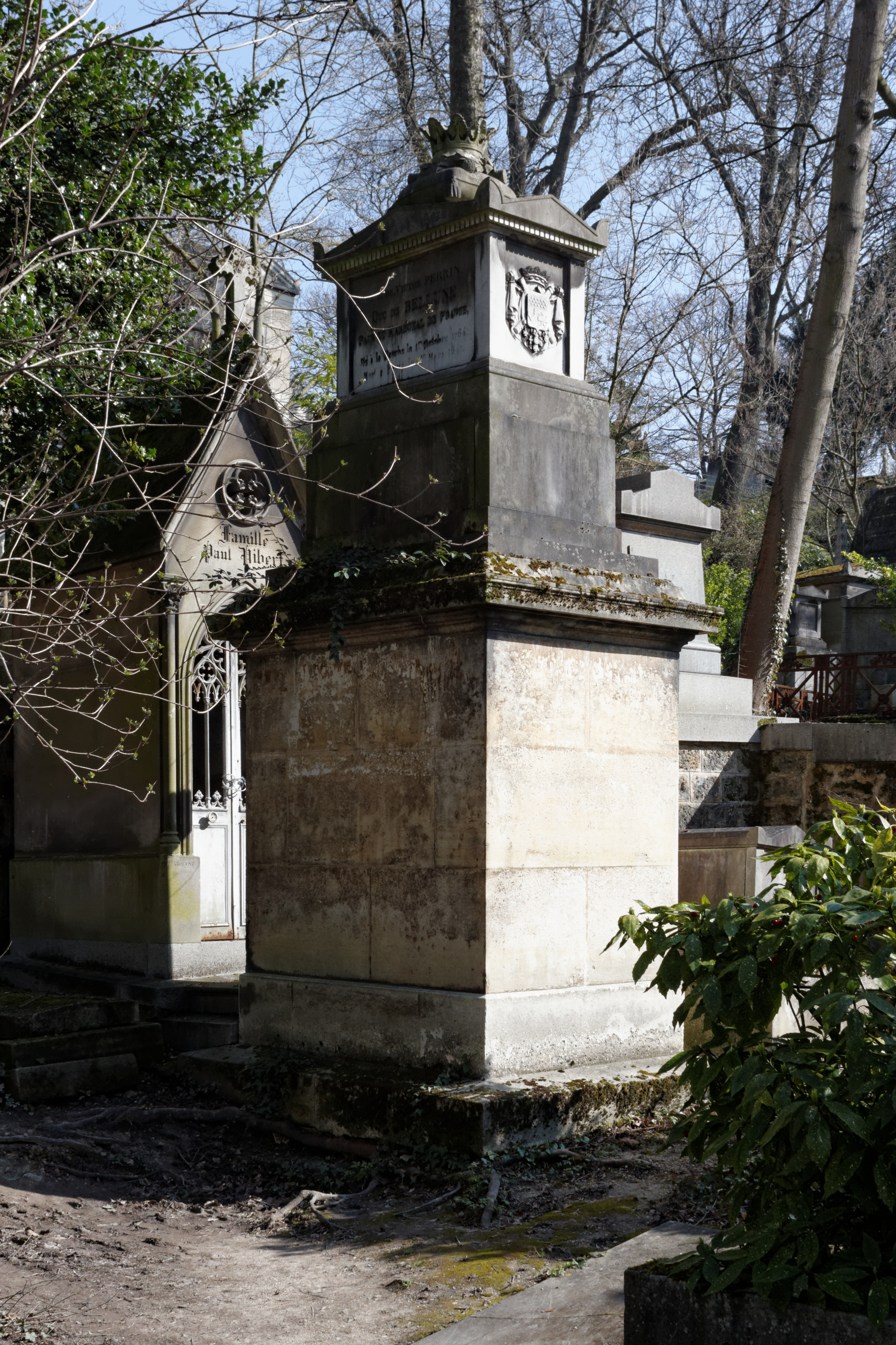 Sépulture de Claude-Victor Perrin, dit Victor (1764-1841), général français de la Révolution et un maréchal d'Empire.